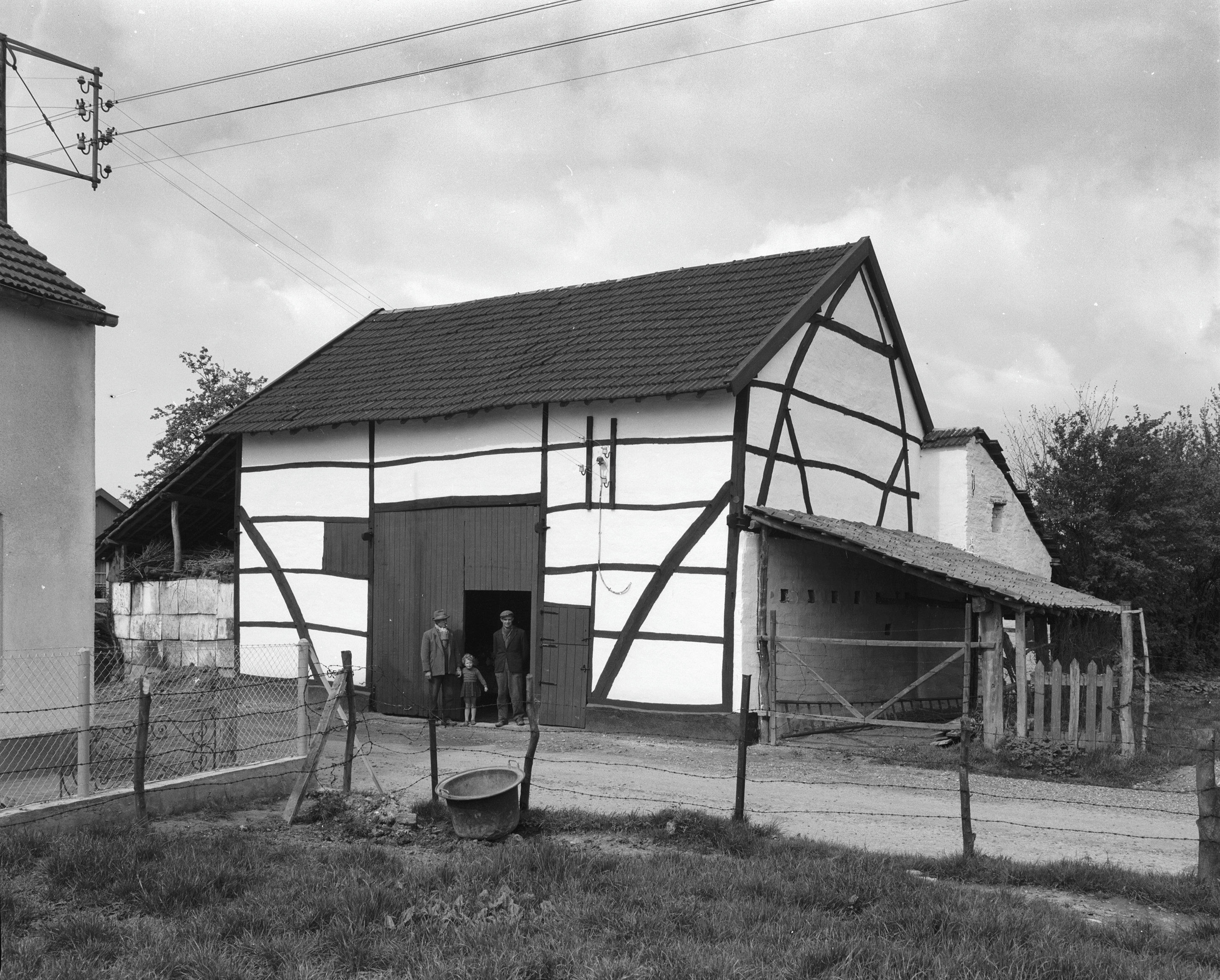 Woonhuizen Diversen: tussen nr.3-6, oogstschuur